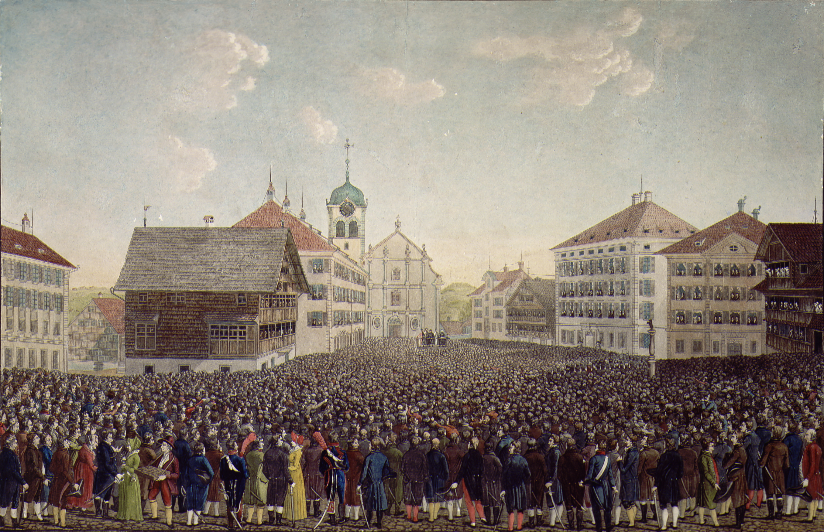 Text dazu: "Besucht von Jhro Exellenz dem Russisch-Kaiserlichen Minister, Grafen von Capo D’Istria nebst mehreren Auswärtigen Hohen Staats Personen und einer Menge fremder Zuschauer". Nach einer Zeichnung von Johann Jakob Mock. Abbild mit dem Landsgemeindeplatz in Trogen mit der Kirche, dem alten Rathaus, dem Zellwegerschen Doppelpalast, dem Haus Nr. 4, der Krone, dem späteren Rathaus und dem Pfarr- und Gemeindehaus sowie der Landsgemeinde.